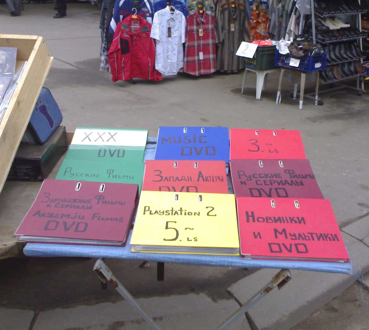 Top Manta en Riga Letonia Latvia